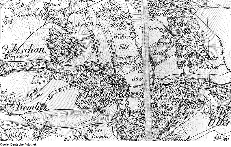 Original image description from the Deutsche FotothekBelgershain-Rohrbach. Oberreit, Sect. Leipzig, 1836/39